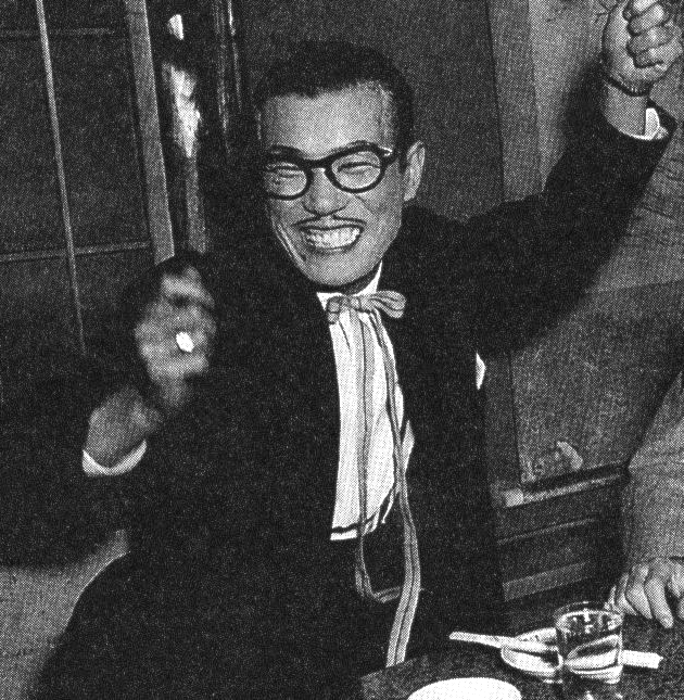 Tony Tani (トニー谷)